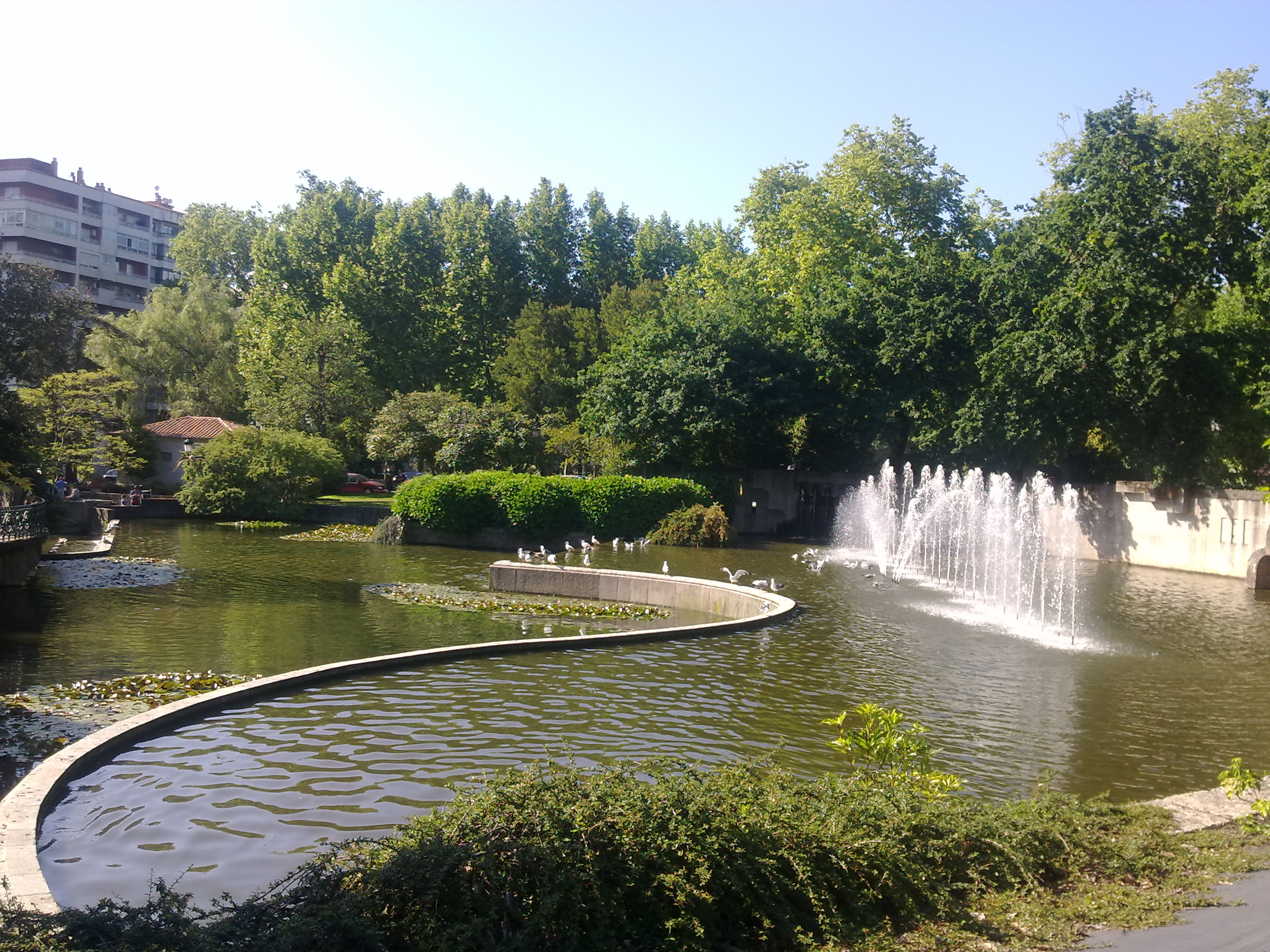 Fuente perteneciente al parque Quiñones de León de Vigo, más conocido como parque de Castrelos